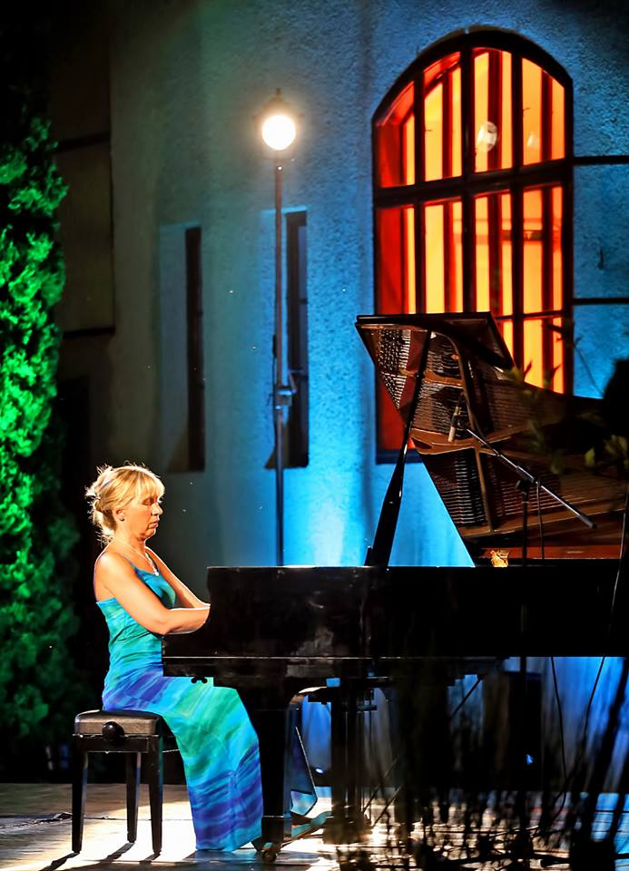 Rita Kinka, pijanistkinja